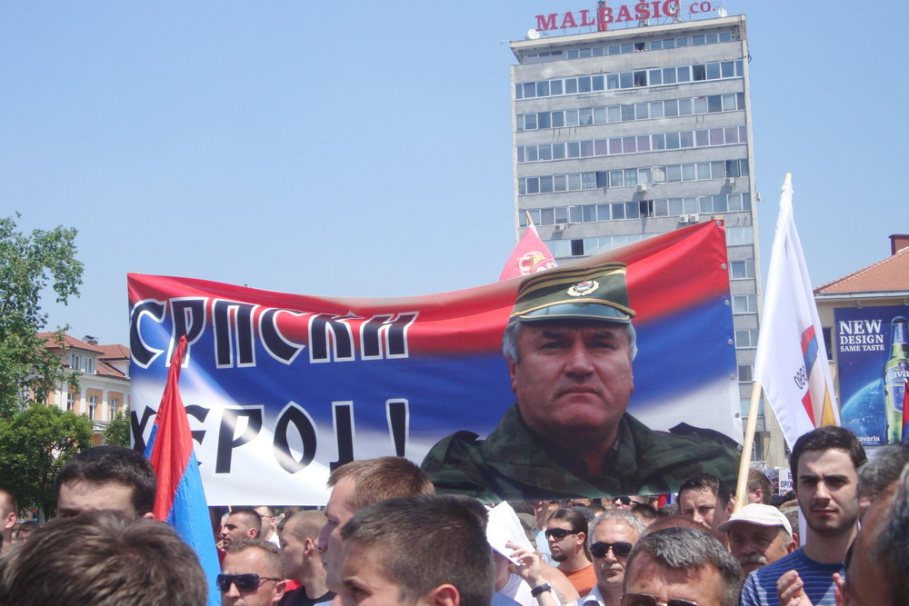 Протести против хапшења Ратка Младића (Бања Лука)